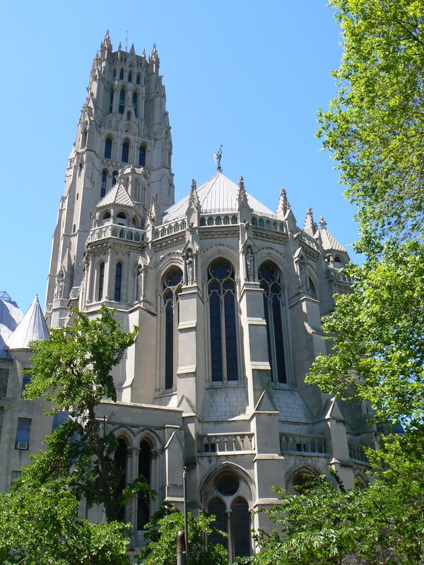 The Riverside Church Auteur : Olivier Perrin